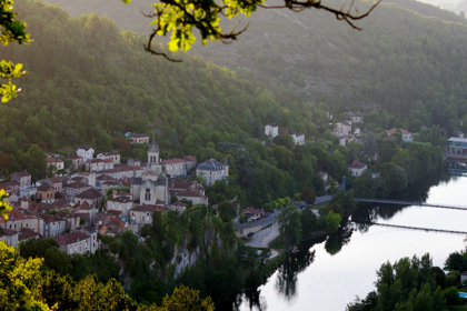 Vue d'Albas depuis la Table d'orientation. Source Photo libre de droits de Jerome Bourreau Guggenheim